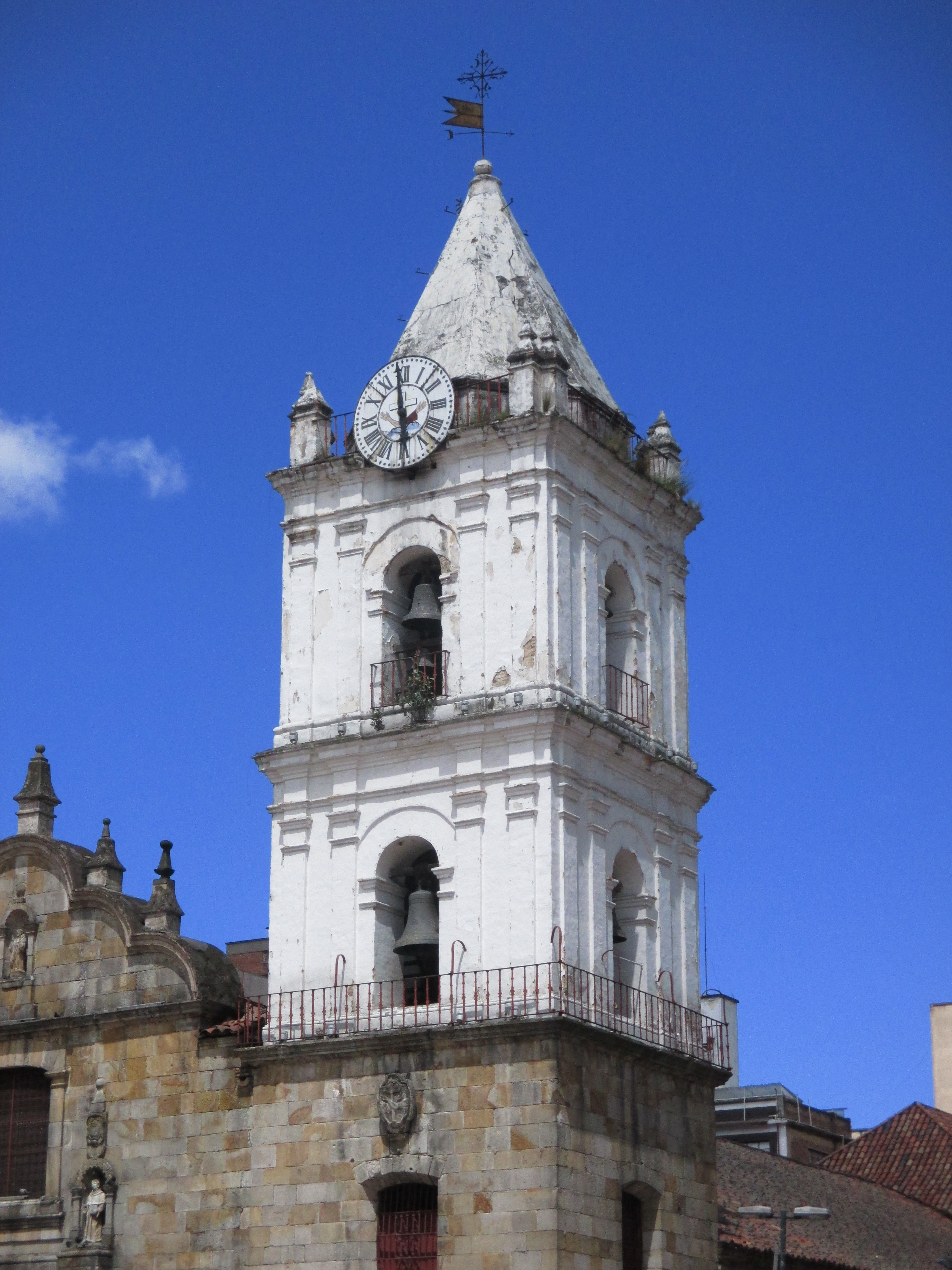 Bogotá